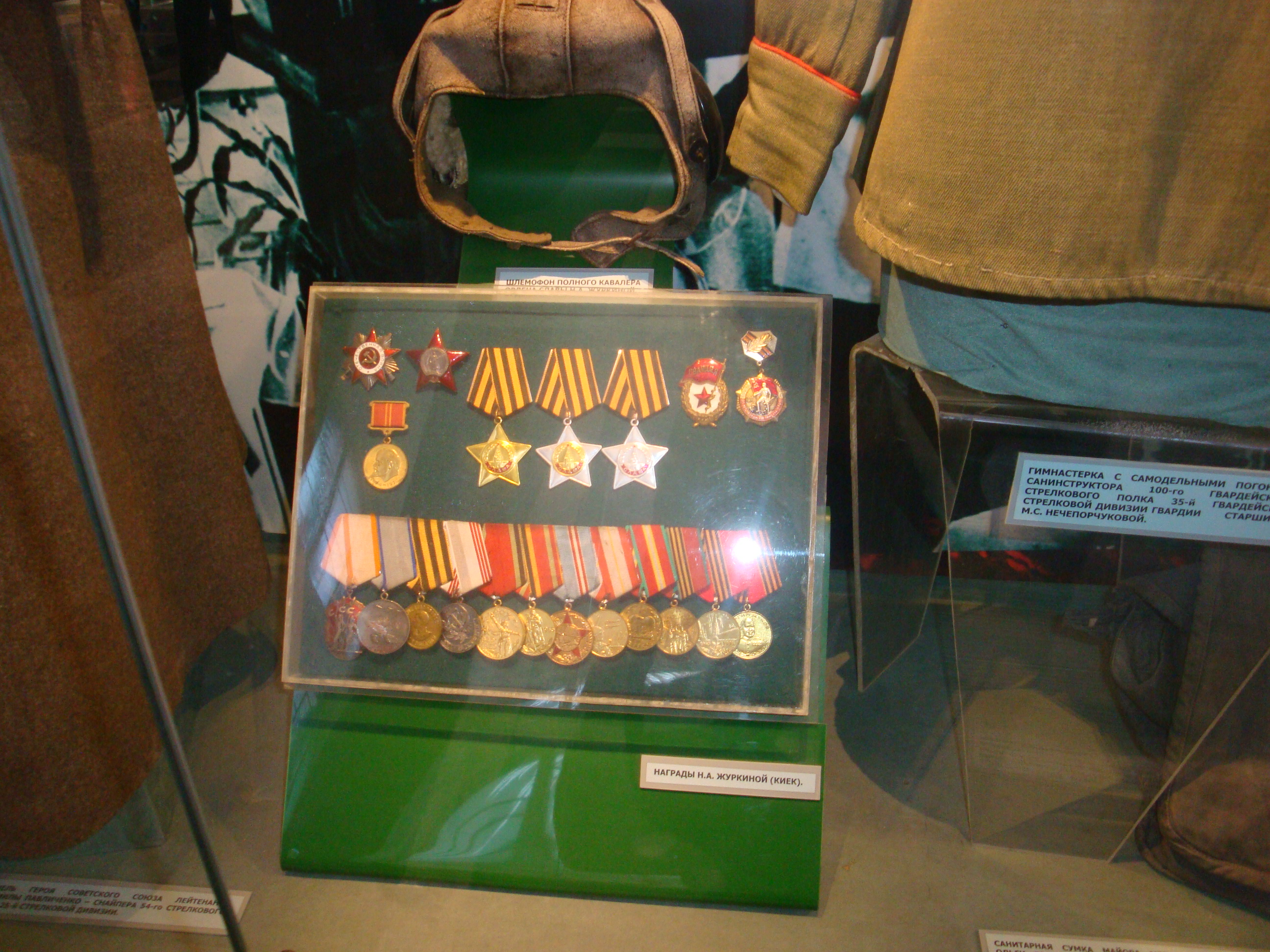 Награды Надежды Александровны Журкиной